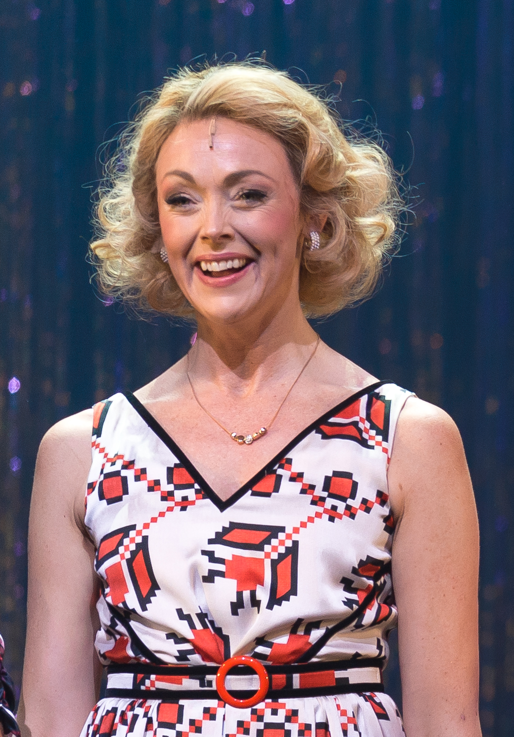 Linda Olsson i musikalen Häxorna i Eastwick på Cirkus i Stockholm 2019. Med Peter Jöback, Linda Olsson, Kayo Shekoni, Vanna Rosenberg, Sussie Eriksson, Jan Mybrand med flera.